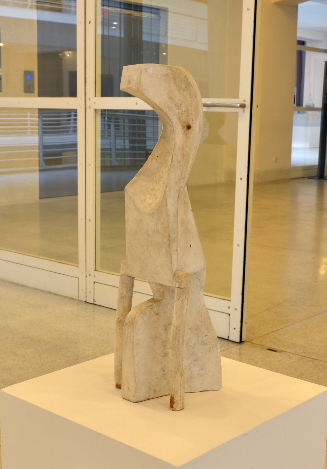 Zbyněk Sekal, Bez názvu (1992), sádra